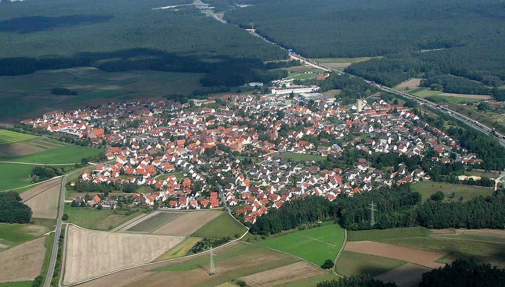 Luftaufnahme von Kornburg im September 2008. Blick Richtung Osten.